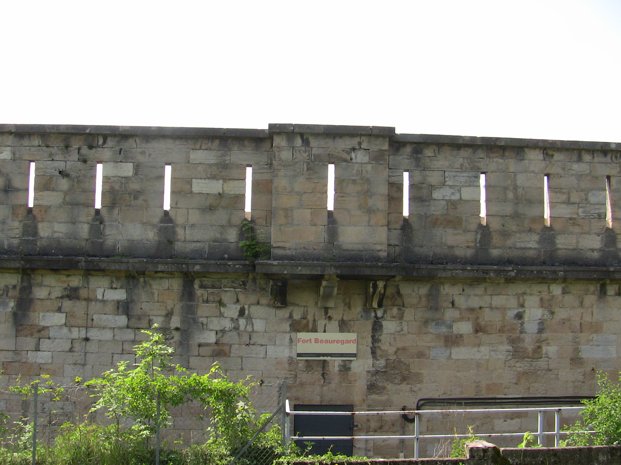 La caserne du fort de Beauregard, à Besançon (Doubs, France).